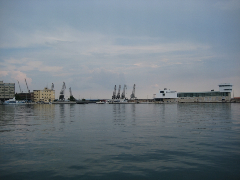 Riječka luka s novim terminalom, Rijeka, Croatia